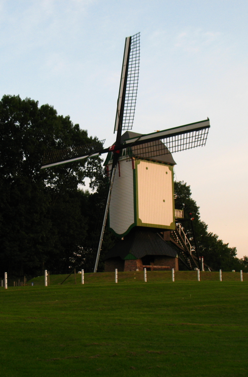 Prins_Bernhard, standerdmolen in Melick, Limburg